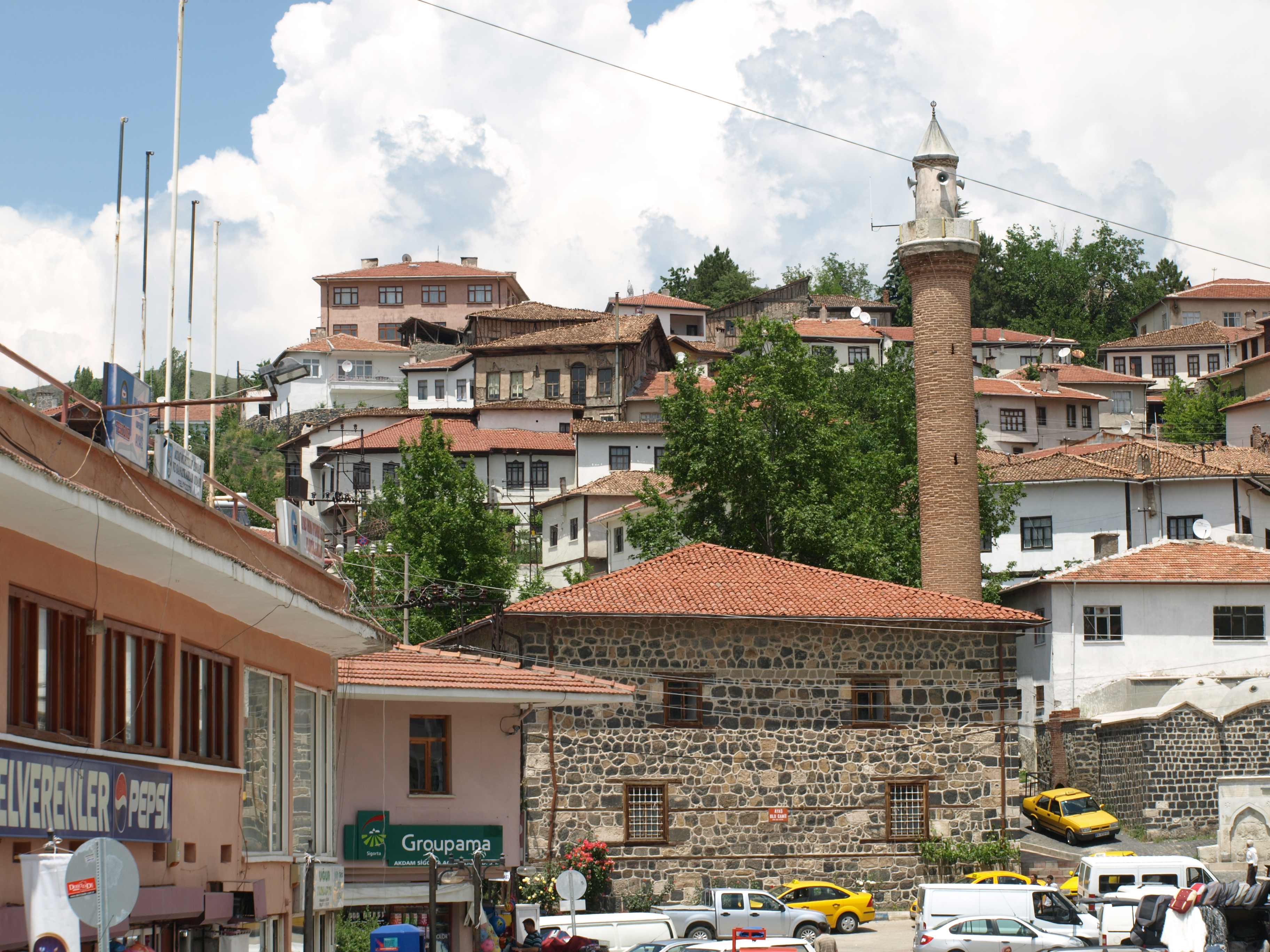 Panorama von Ayaş, Provinz Ankara